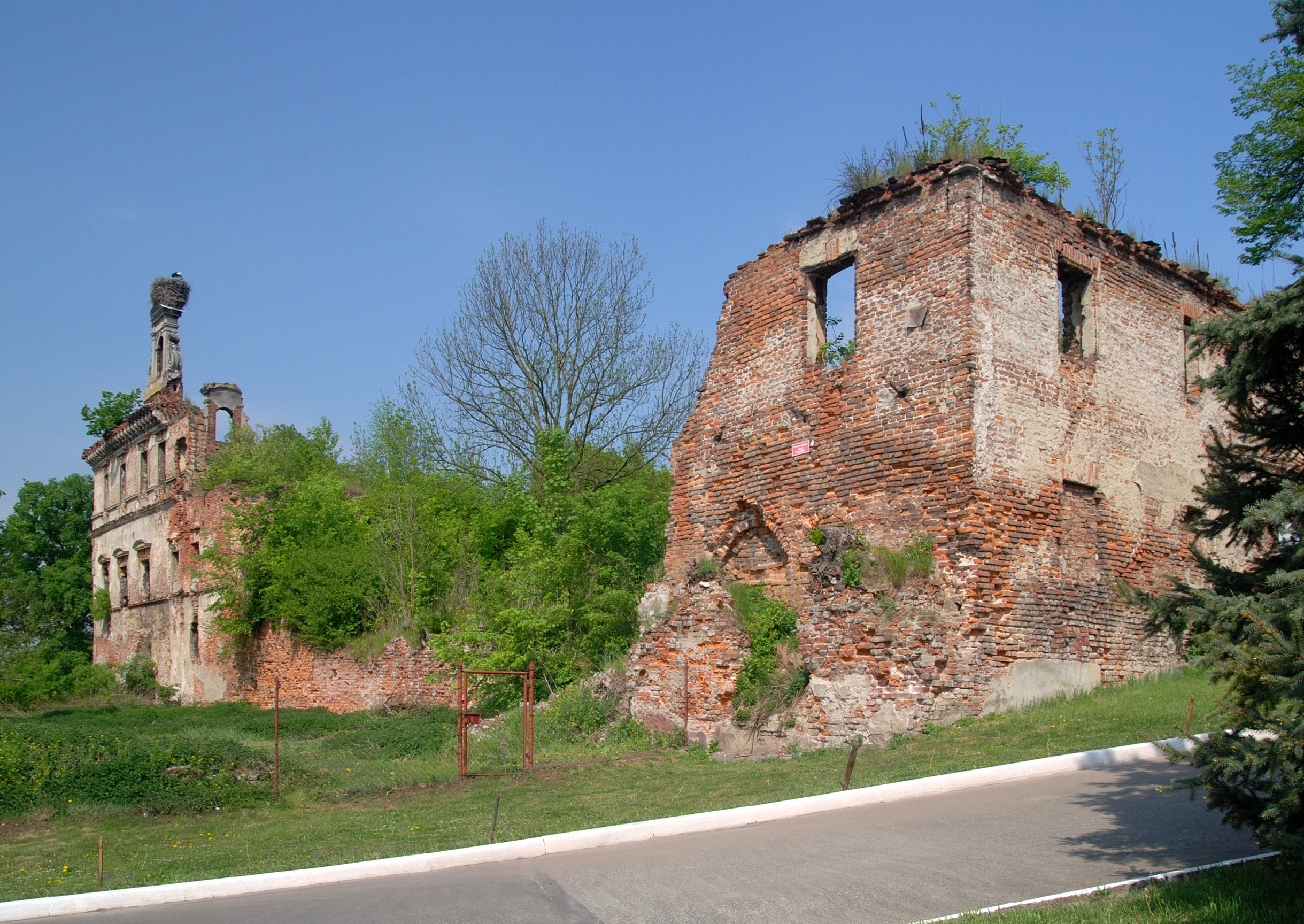 miasto Ujazd